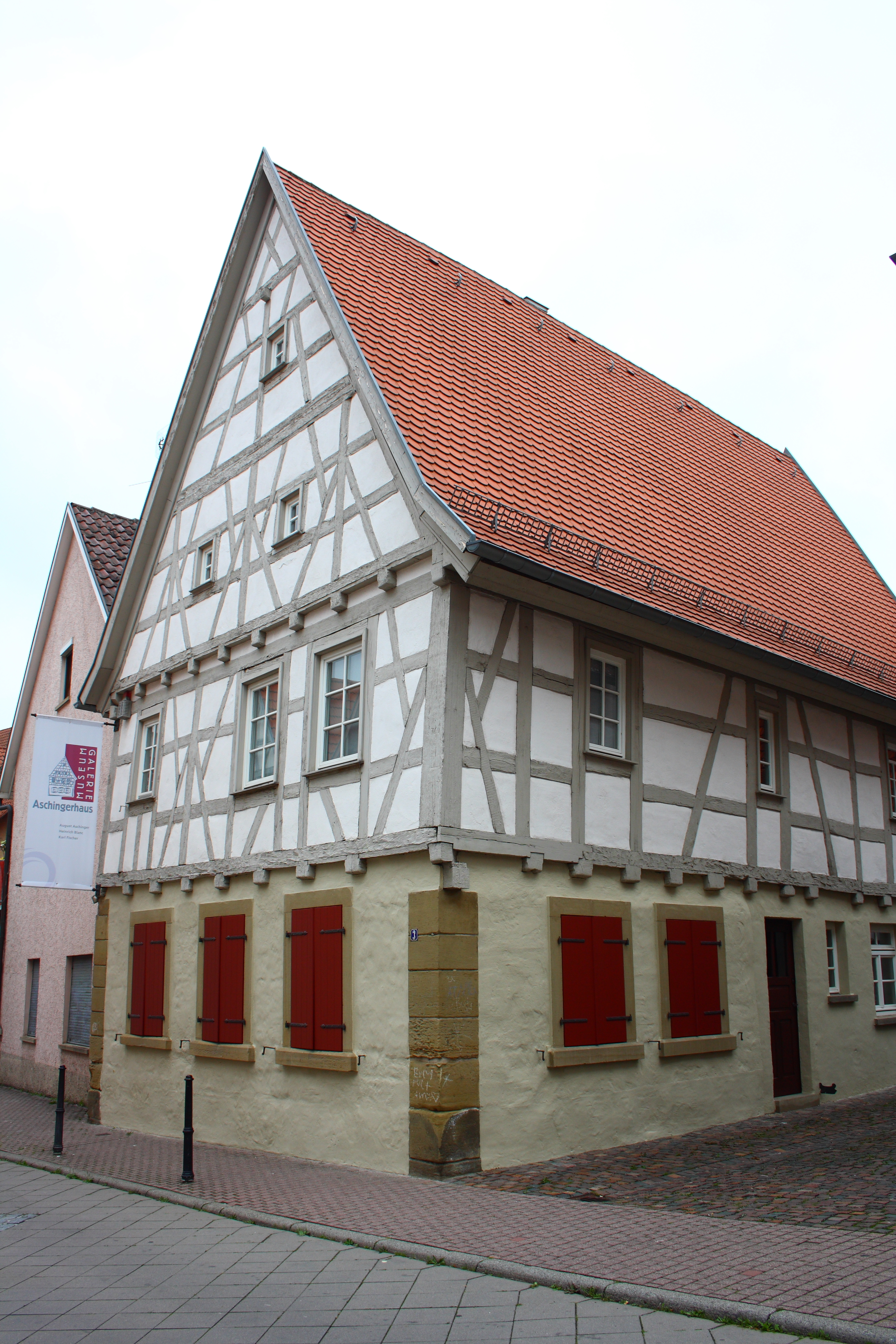 Aschinger Haus in Oberderdingen, Aschinger Straße 3; Geburtshaus von August Aschinger